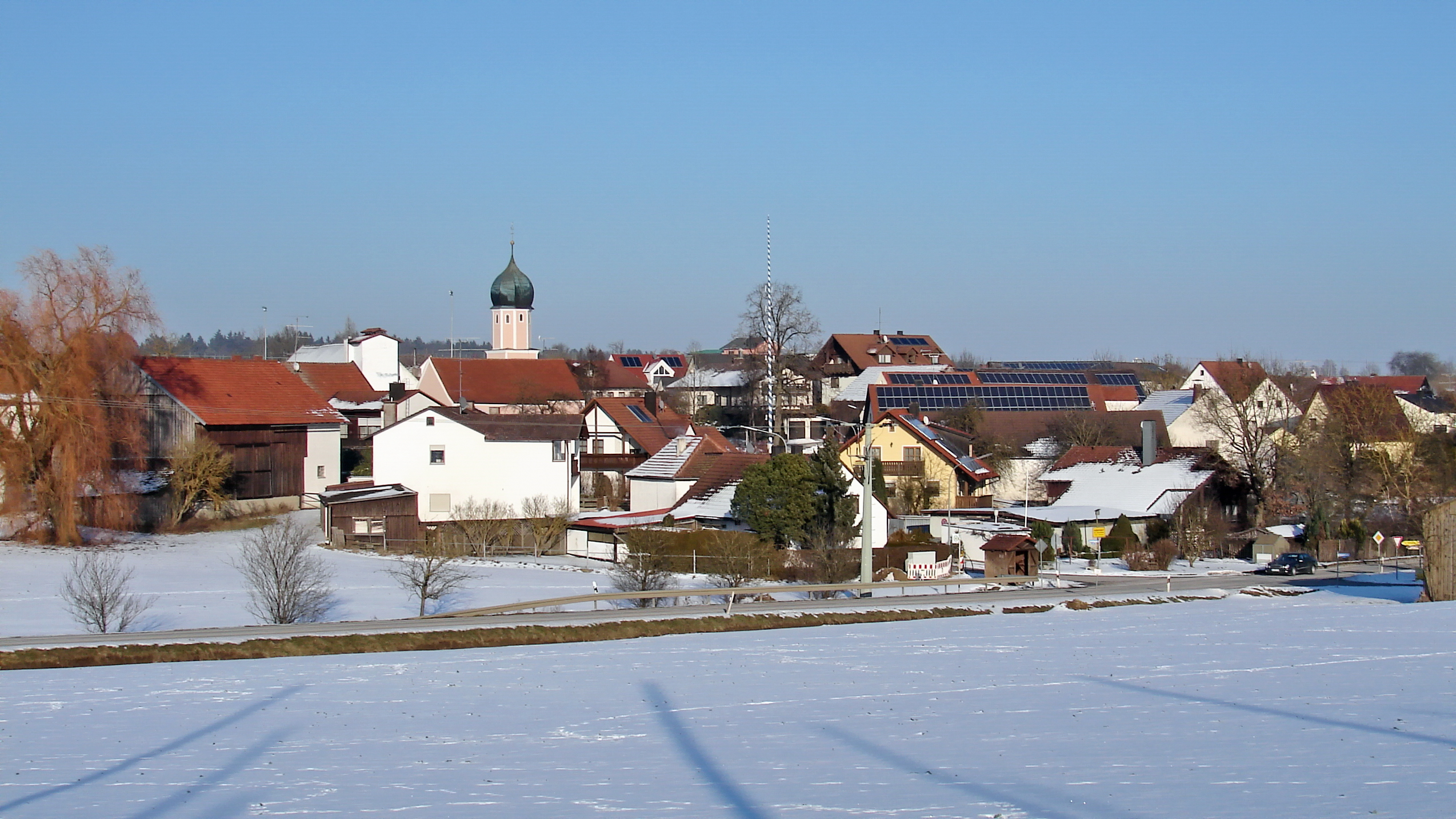 Leibersdorf ist ein Ortsteil der Gemeinde Volkenschwand im niederbayerischen Landkreis Kelheim.